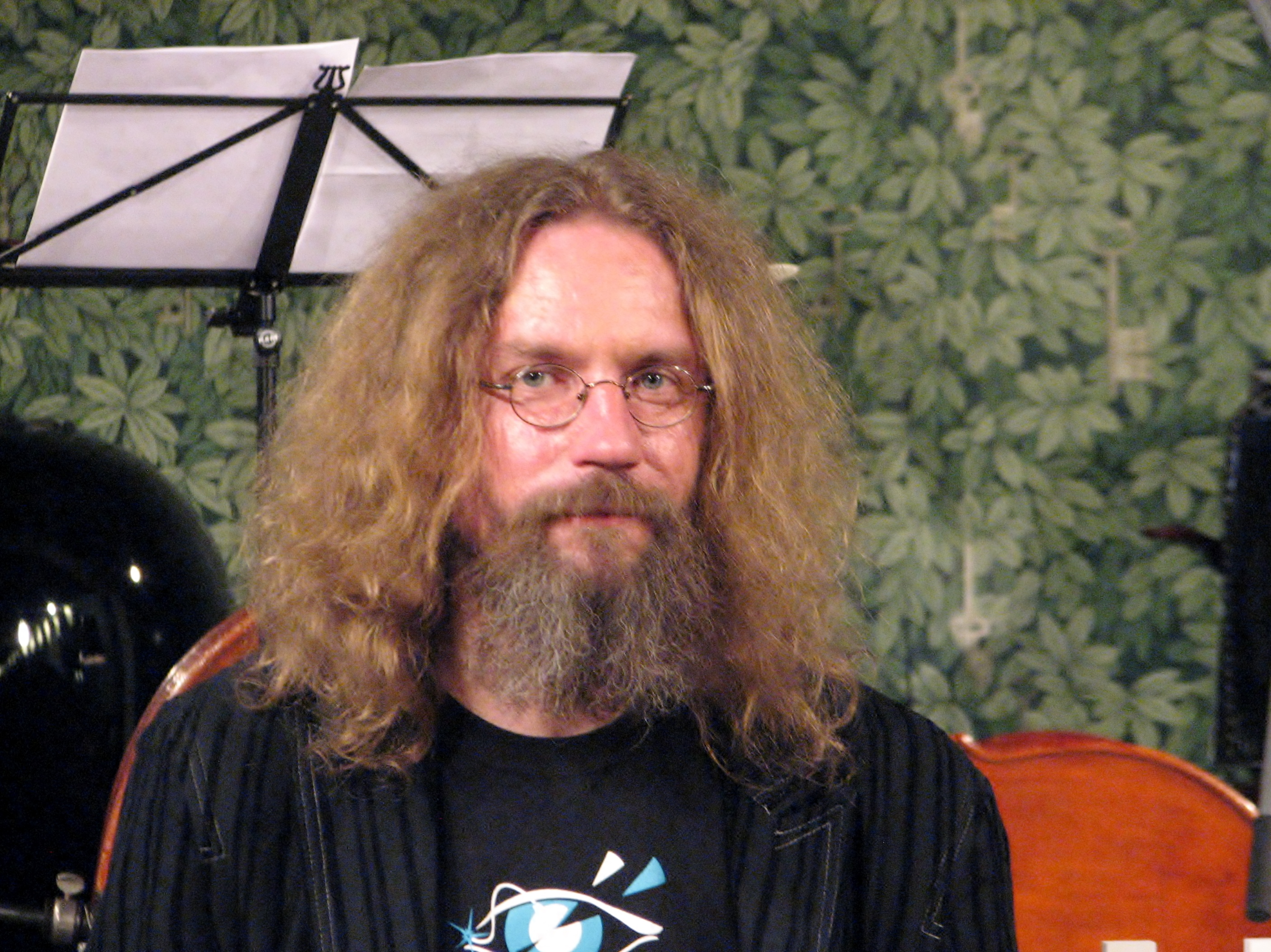 Aapo Ilves kirjandusfestival HeadRead raames Tallinna kirjanike majas Vikerraadio otsesaates